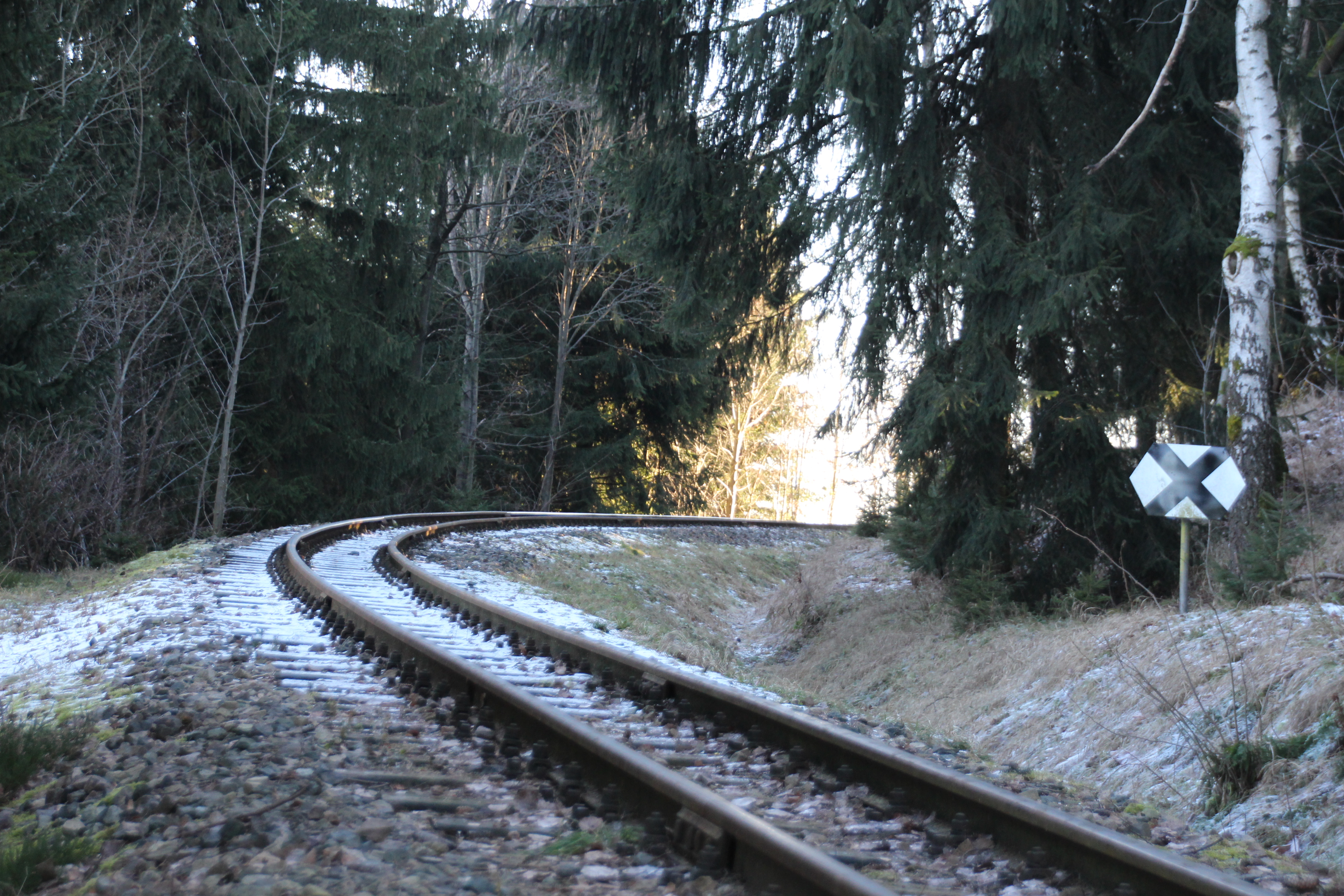 Schönheide im Erzgebirge: Teilstrecke der Museumsbahn ( Museumsbahn Schönheide e. V.) auf der früheren Schmalspurbahn Wilkau-Haßlau–Carlsfeld Strecke Richtung Neuheide.